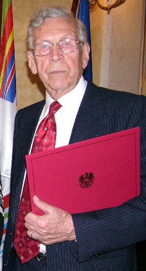 Sepp Tezak bei der Verleihung des Berufstitels Professor